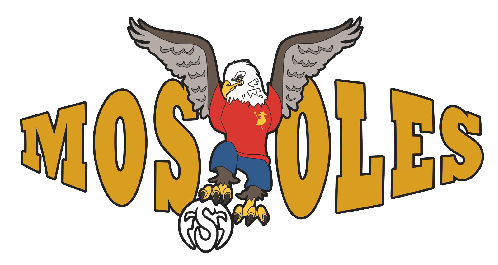 Escudo FSF Mostoles